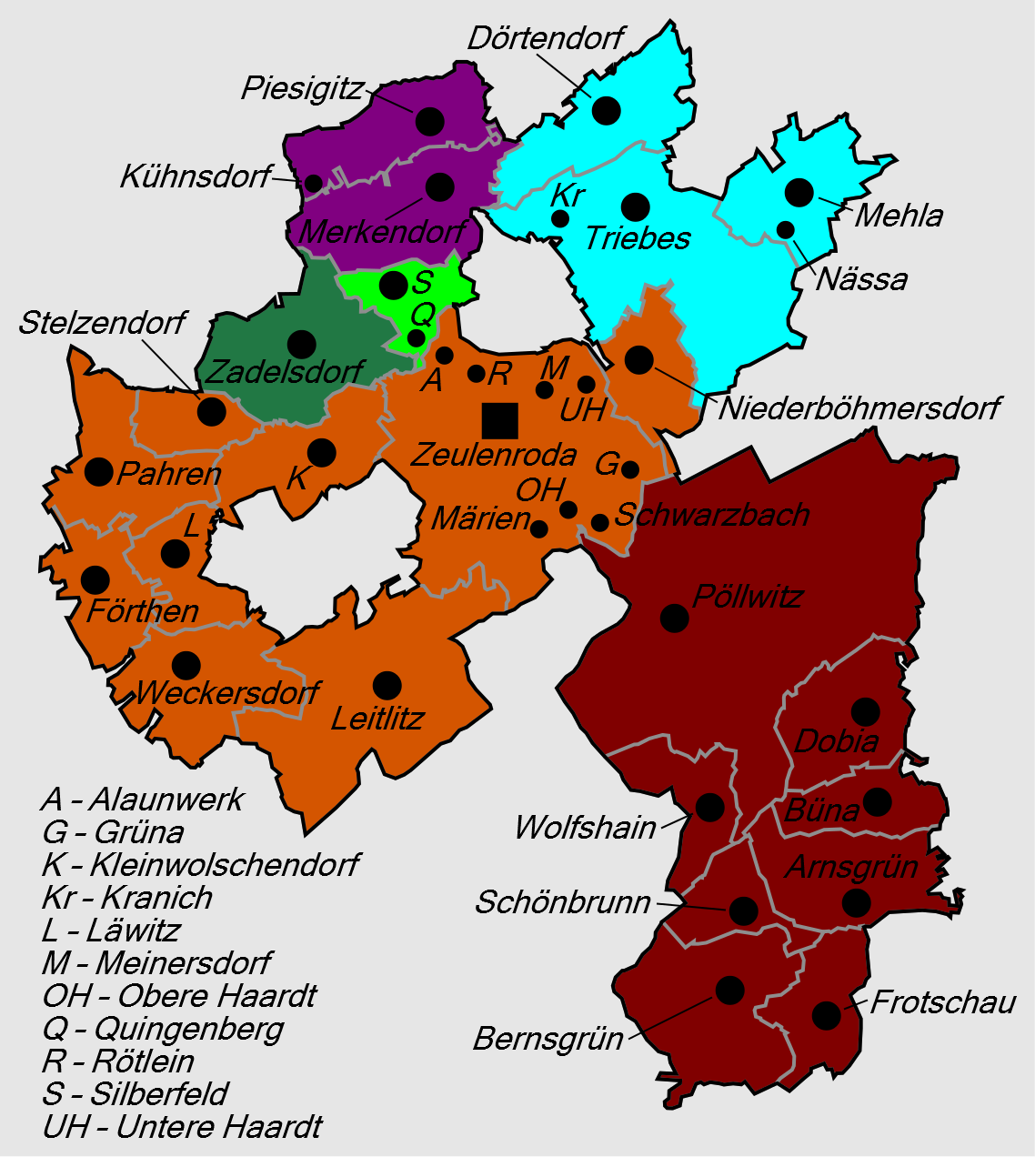 Gliederung der Stadt Zeulenroda-Triebes ab 1. Juli 1999